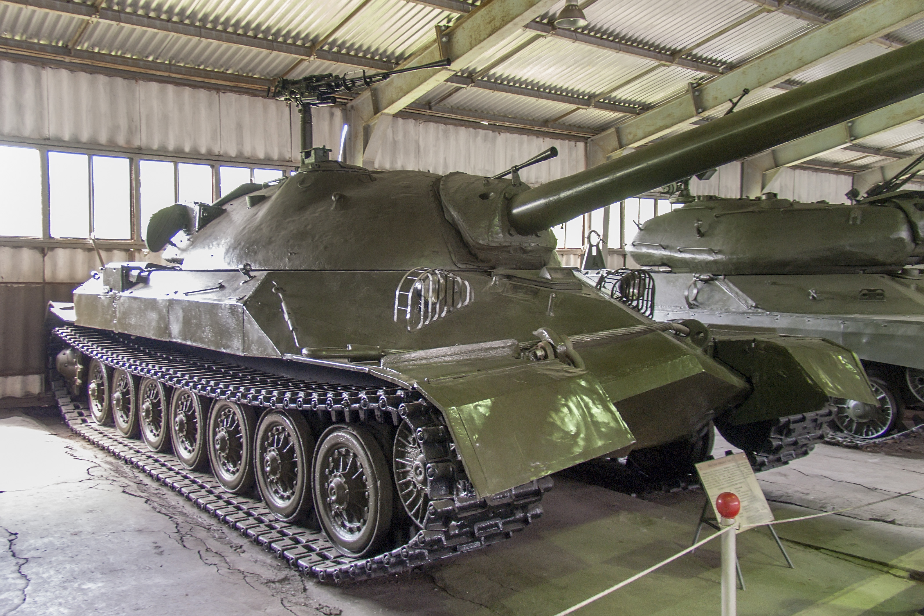 Тяжелый танк ИС-7 в Центральном музее бронетанкового вооружения и техники в Кубинке.